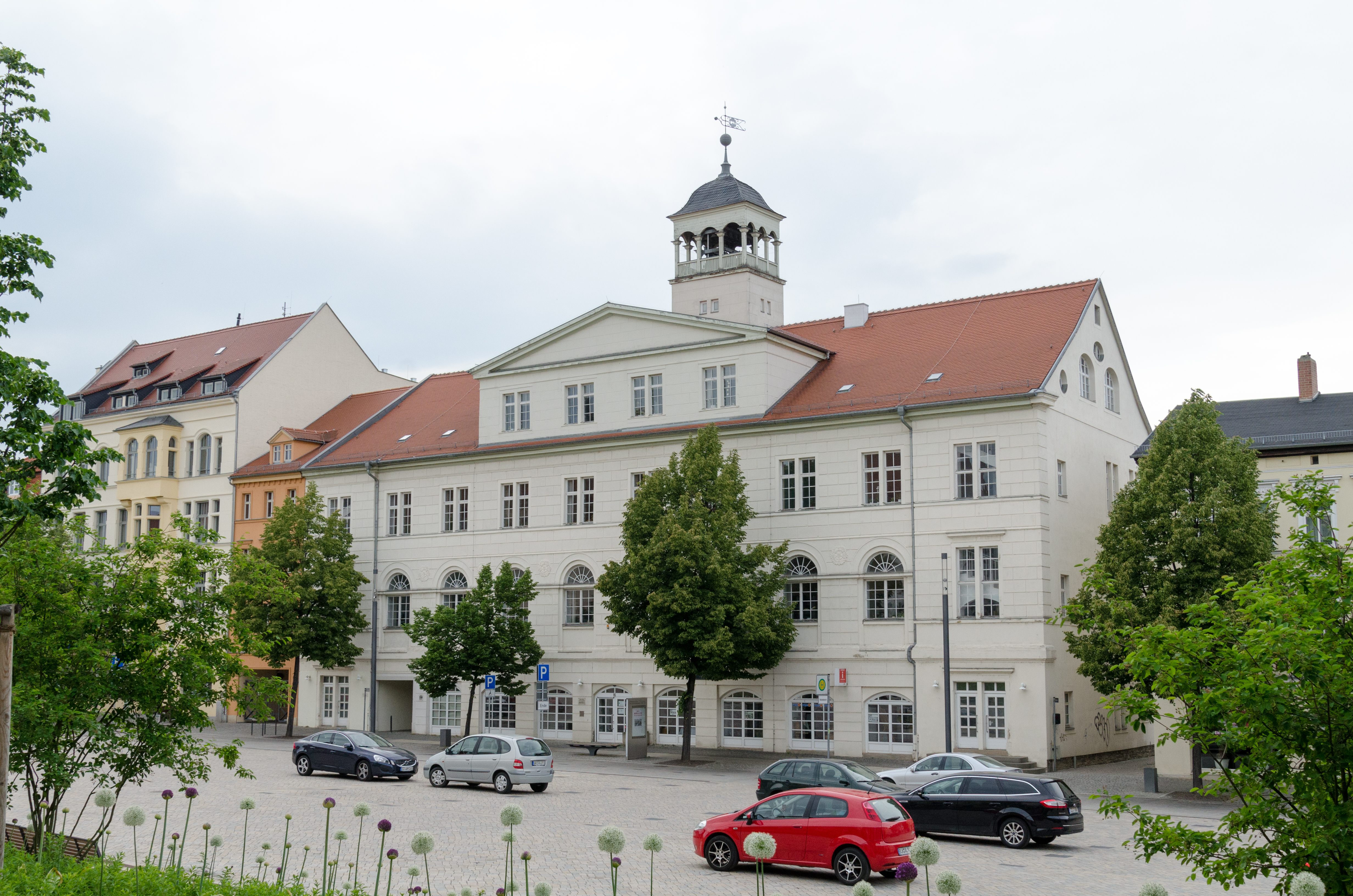 Zeitz, Altmarkt 16